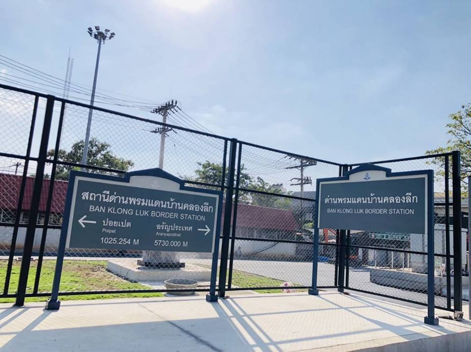 รูปป้ายสถานีรถไฟด่านพรมแดนบ้านคลองลึก